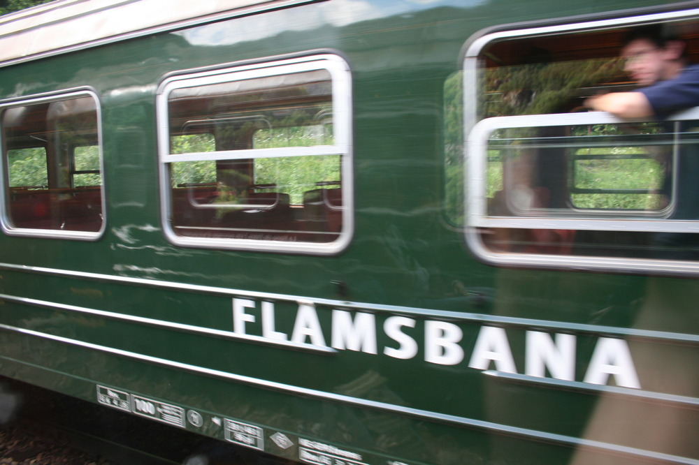 Flåmsbanen in Norway